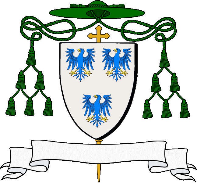 En arc'hant e dri ererig en glazur , krabanet ha pigoset en aour